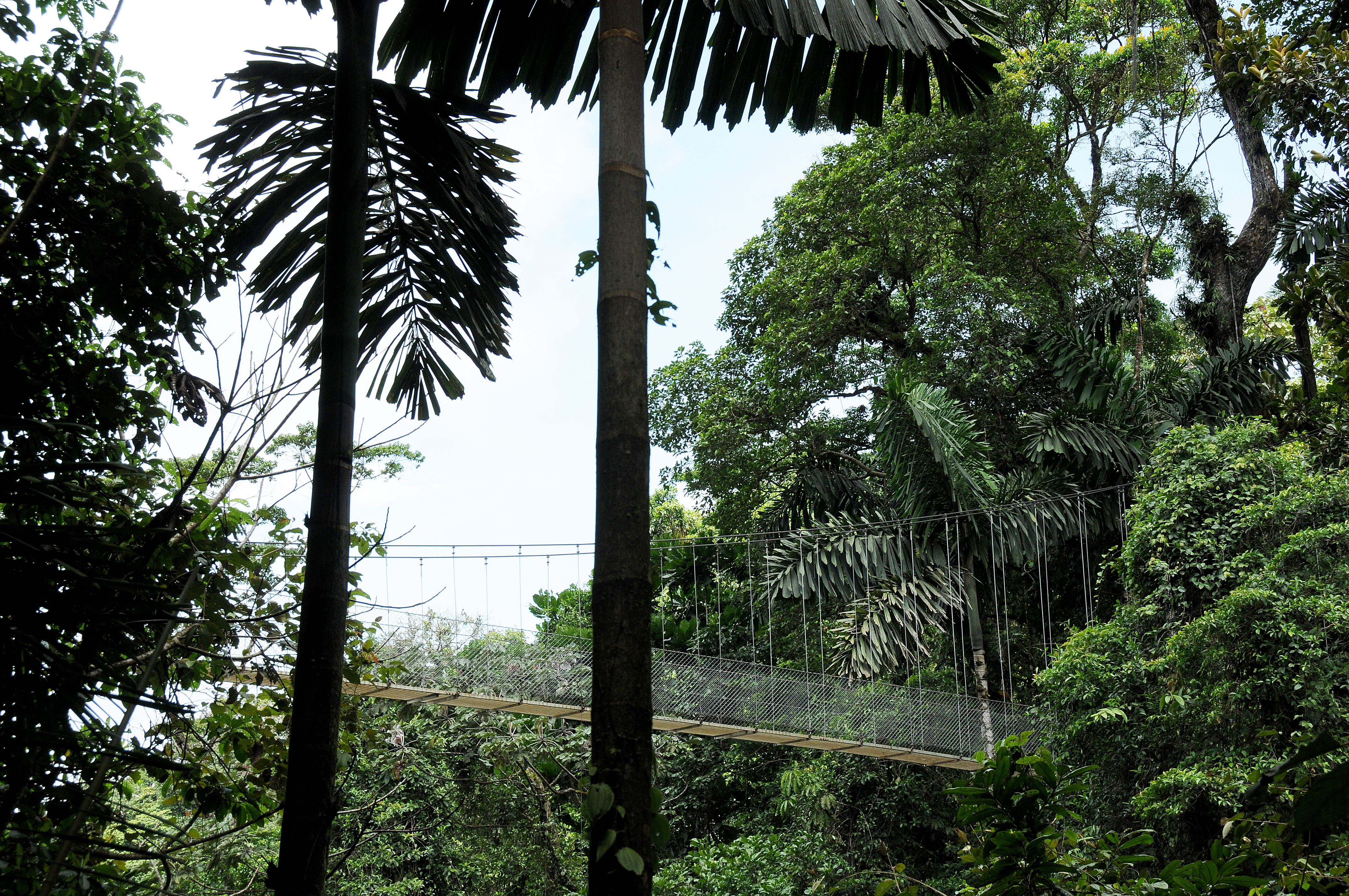 2013-05-29_08-46_Arenal_Hanging_Bridges_0685_adj